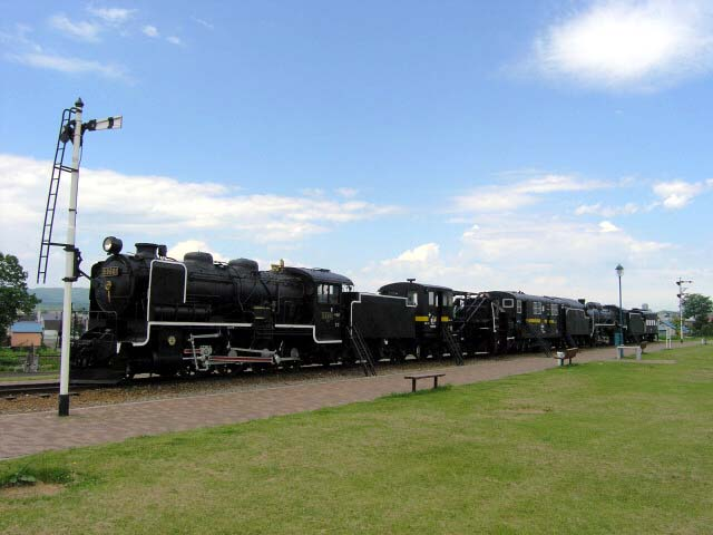 SL除雪列車キマロキ編成 撮影場所 名寄公園